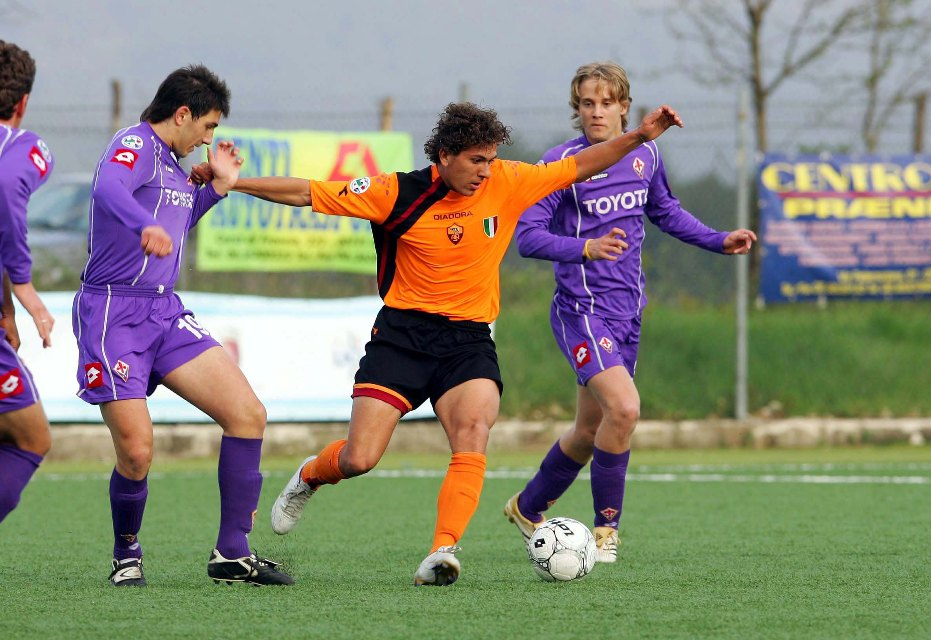 Alessio Cerci con la maglia della Primavera giallorossa durante la seconda edizione del Trofeo Karol Wojtyla